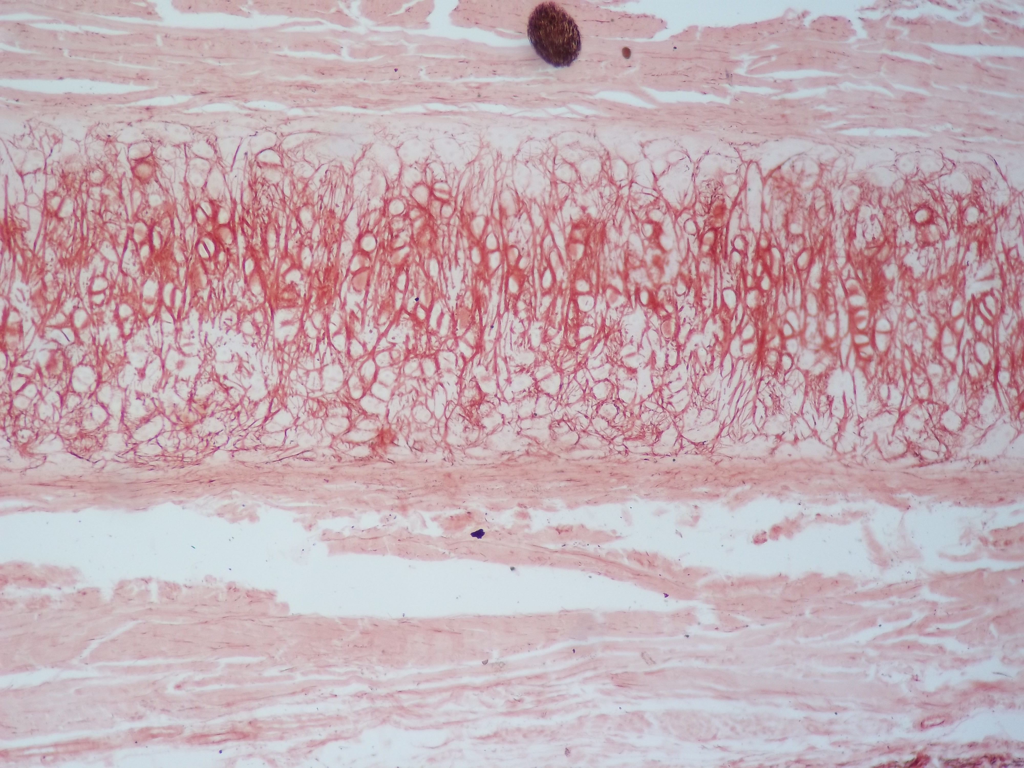 Cartílago elástico; 100X.